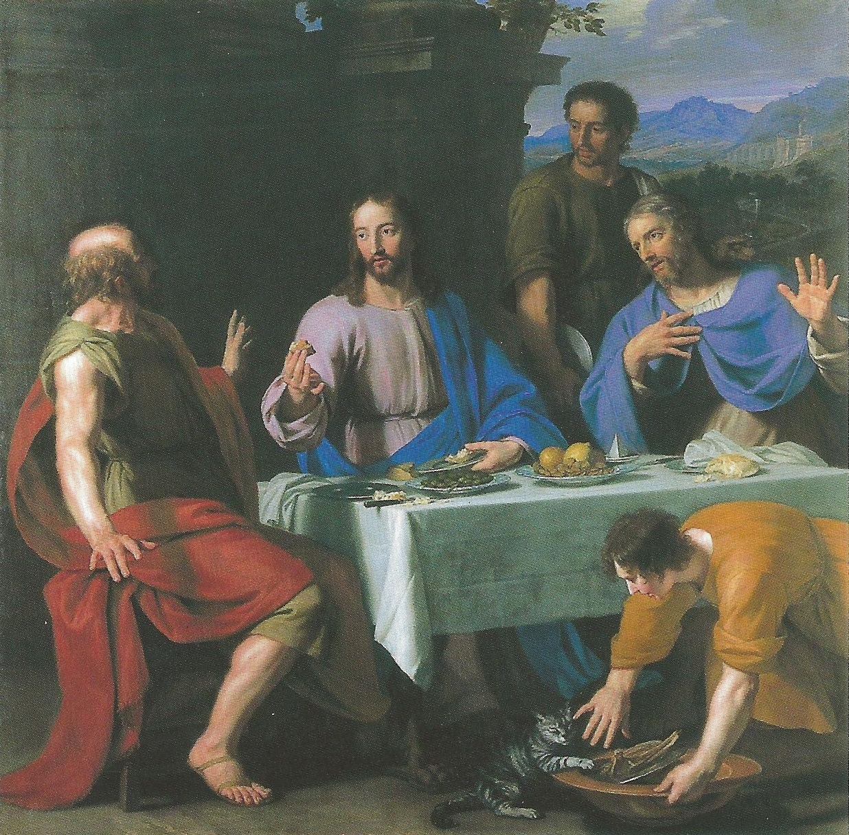 EmmausgangersSupper at Emmaustitle QS:P1476,nl:"Emmausgangers" label QS:Lnl,"Emmausgangers"